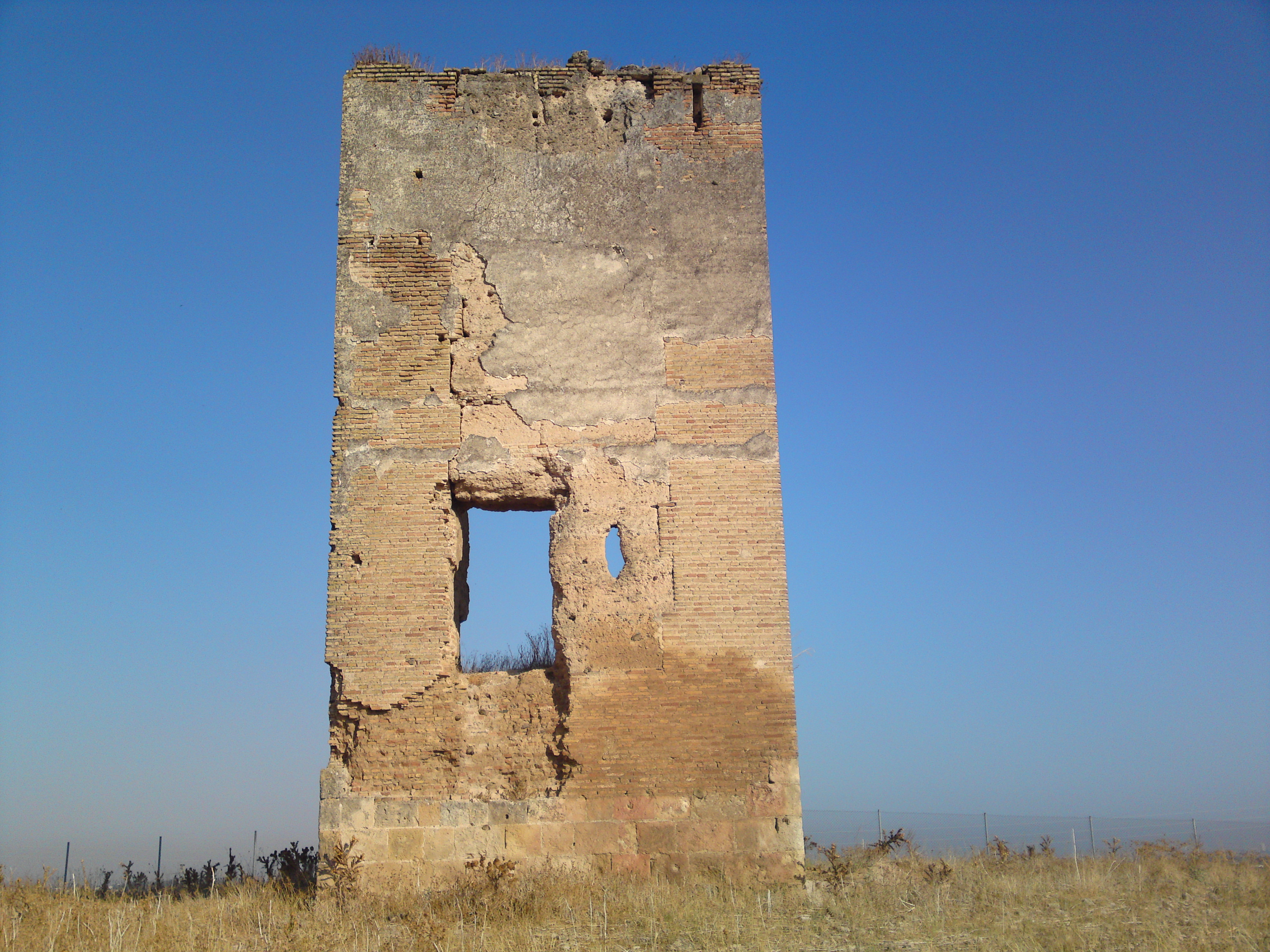 Restos de,la torre de los herberos, lo mas visible del yacimiento arqueológico de Orippo Dos Hermanas - Sevilla - Andalucía - España